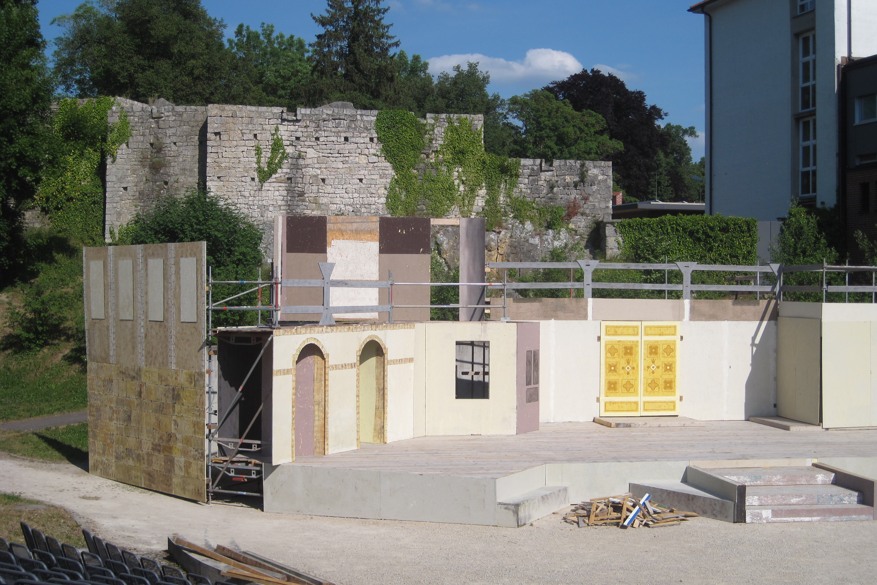 Freilichtbühne am Mangoldfelsen in Donauwörth, Brabanter Weg.